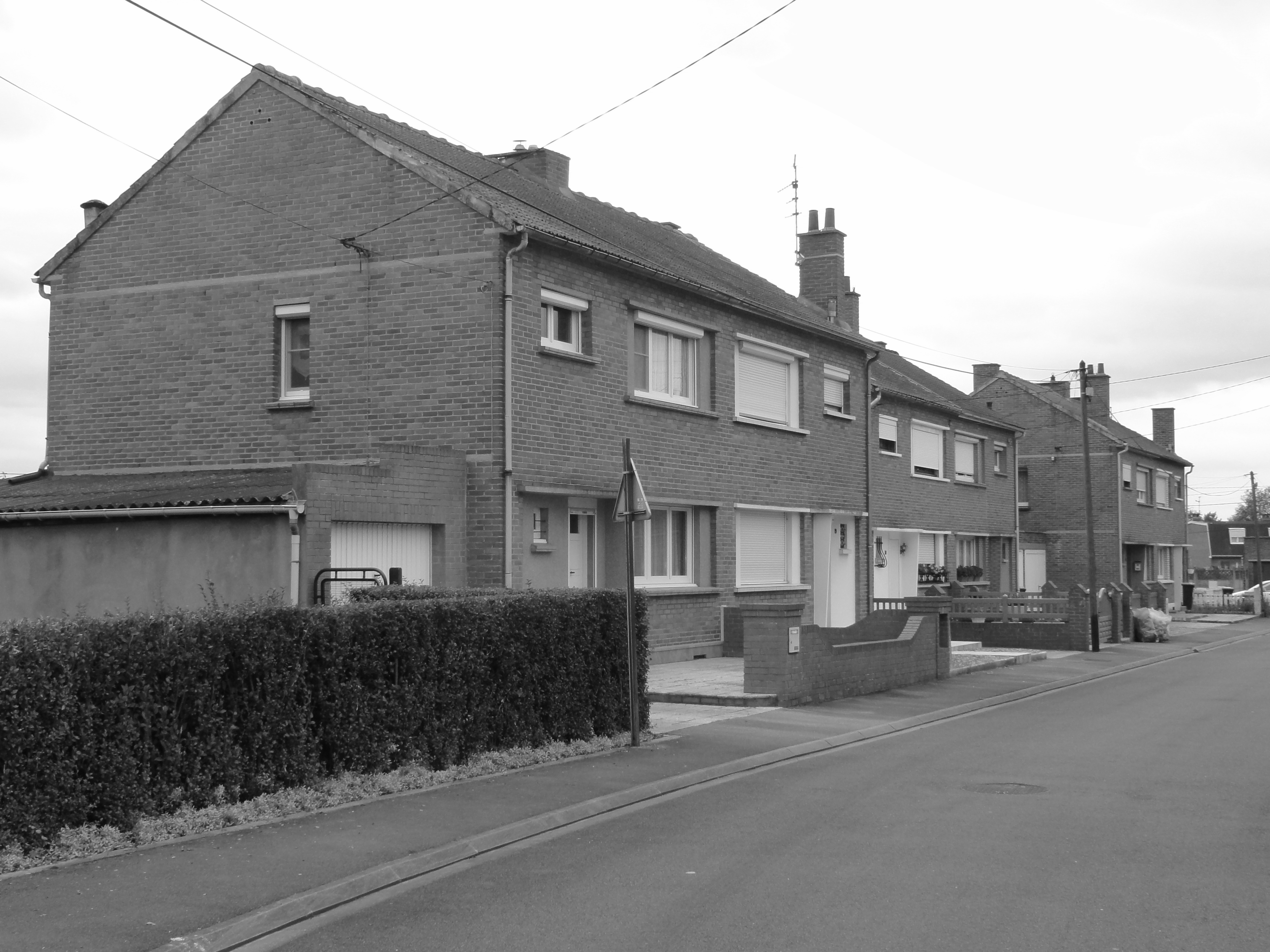 Cité de la Fosse n° 6 de la Compagnie des mines de Lens, Haisnes, Pas-de-Calais, Nord-Pas-de-Calais, France.